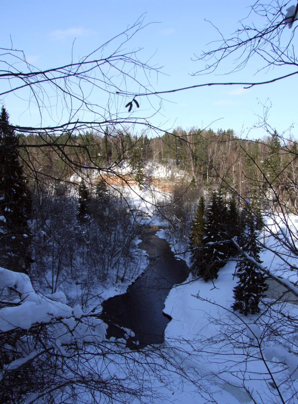 Brasla, 06.01.2010.